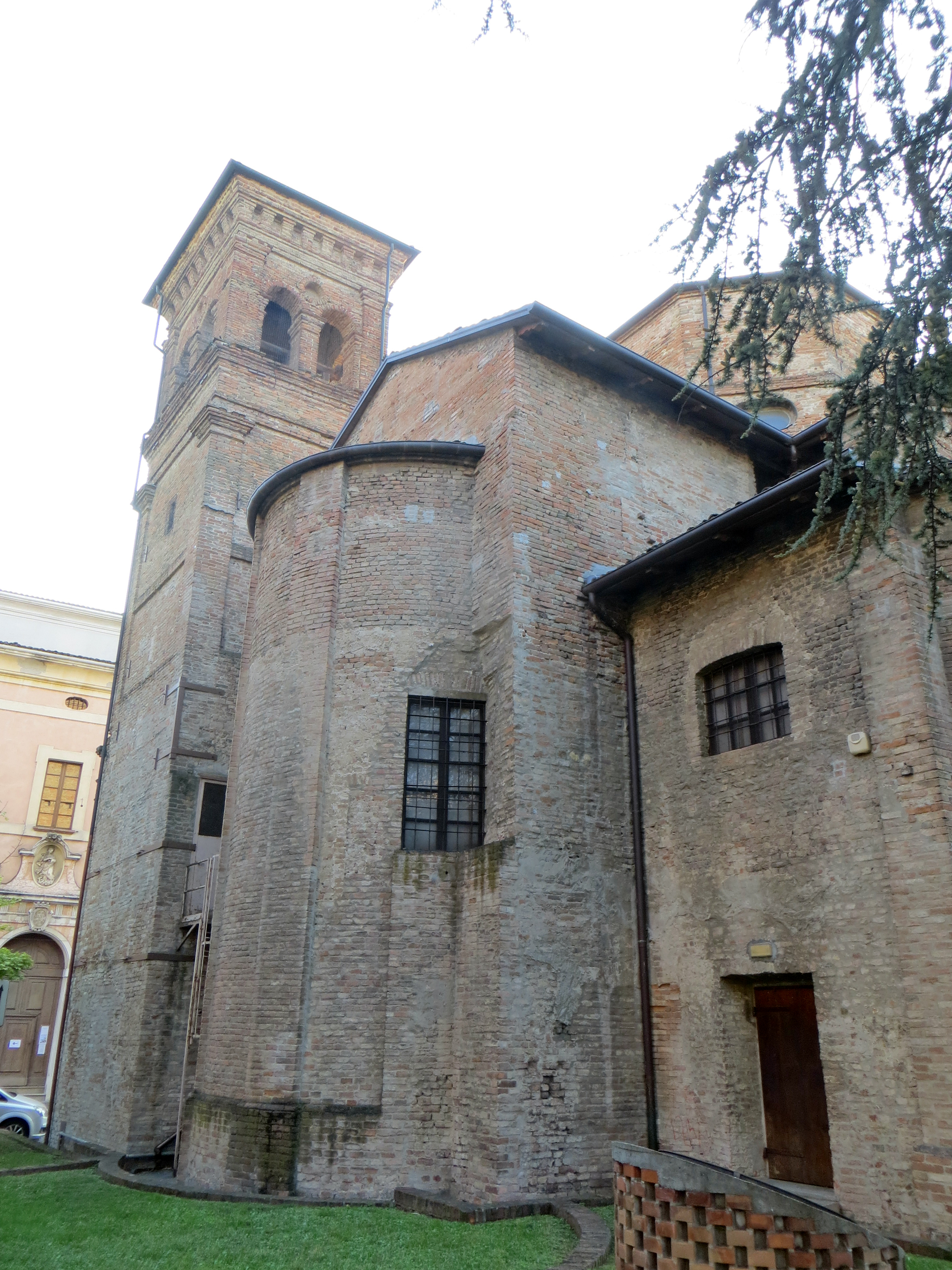 Chiesa di San Michele Arcangelo (Fidenza) - lato est